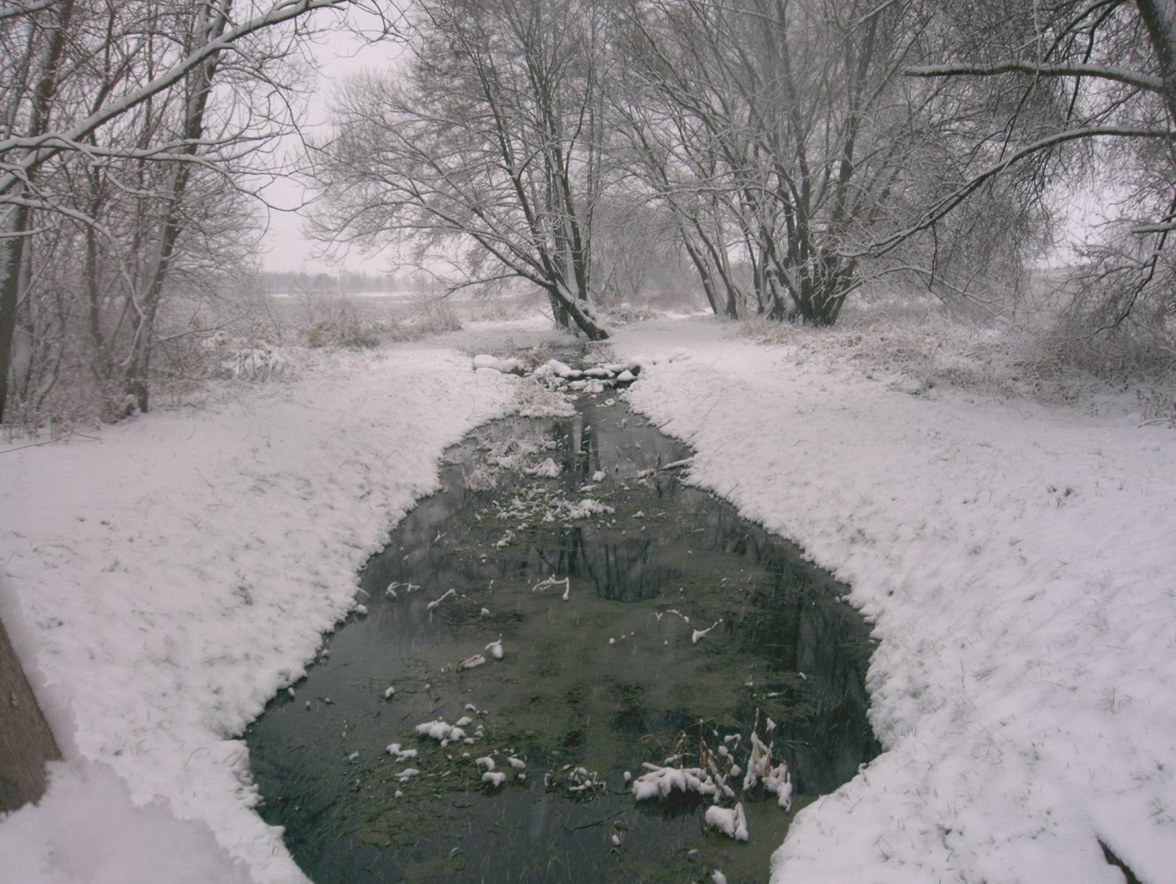 Wilderness at Berlin-Karow in December 2006.